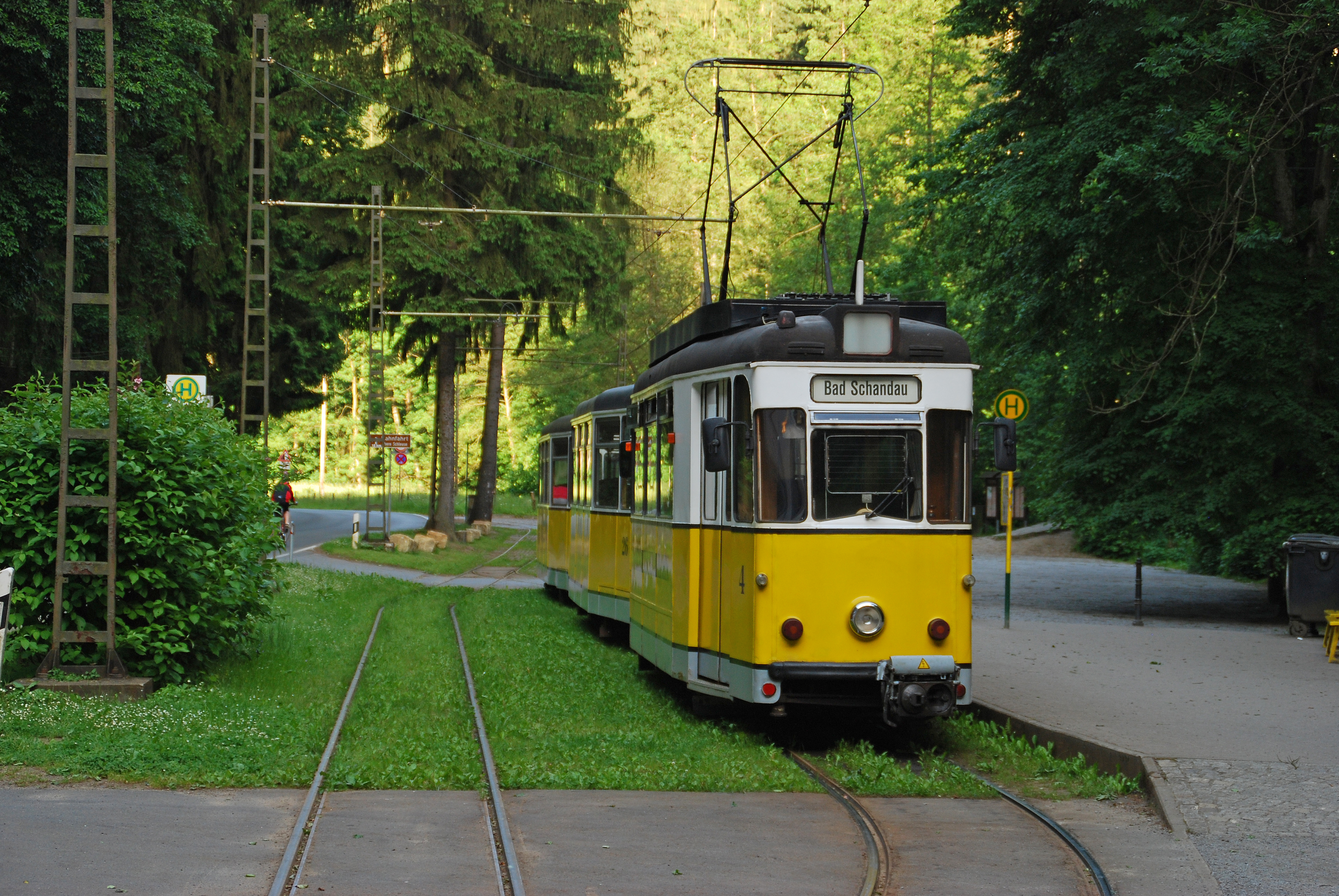 Kirnitschtalbahn